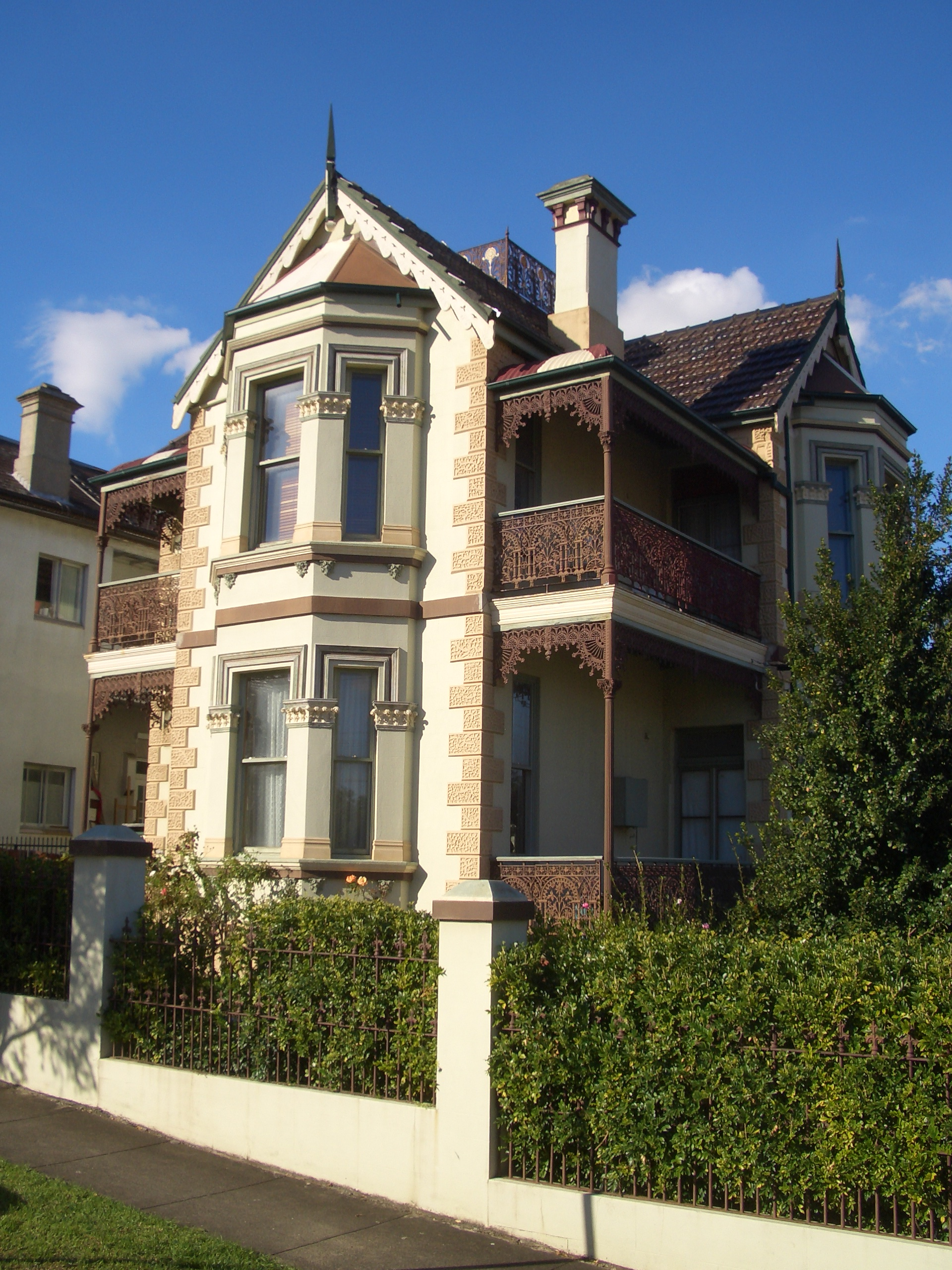 Petersham